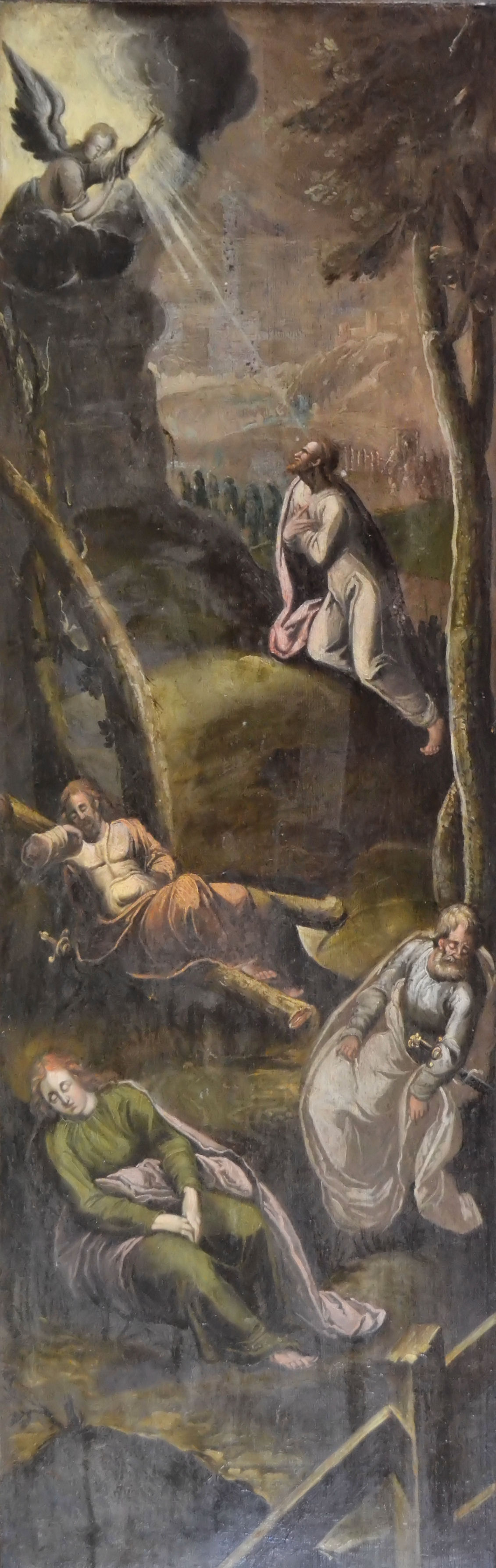 Marianowo - zespół klasztorny cystersów